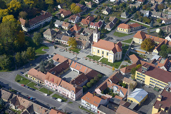 Zalaszentgrót légi fotó